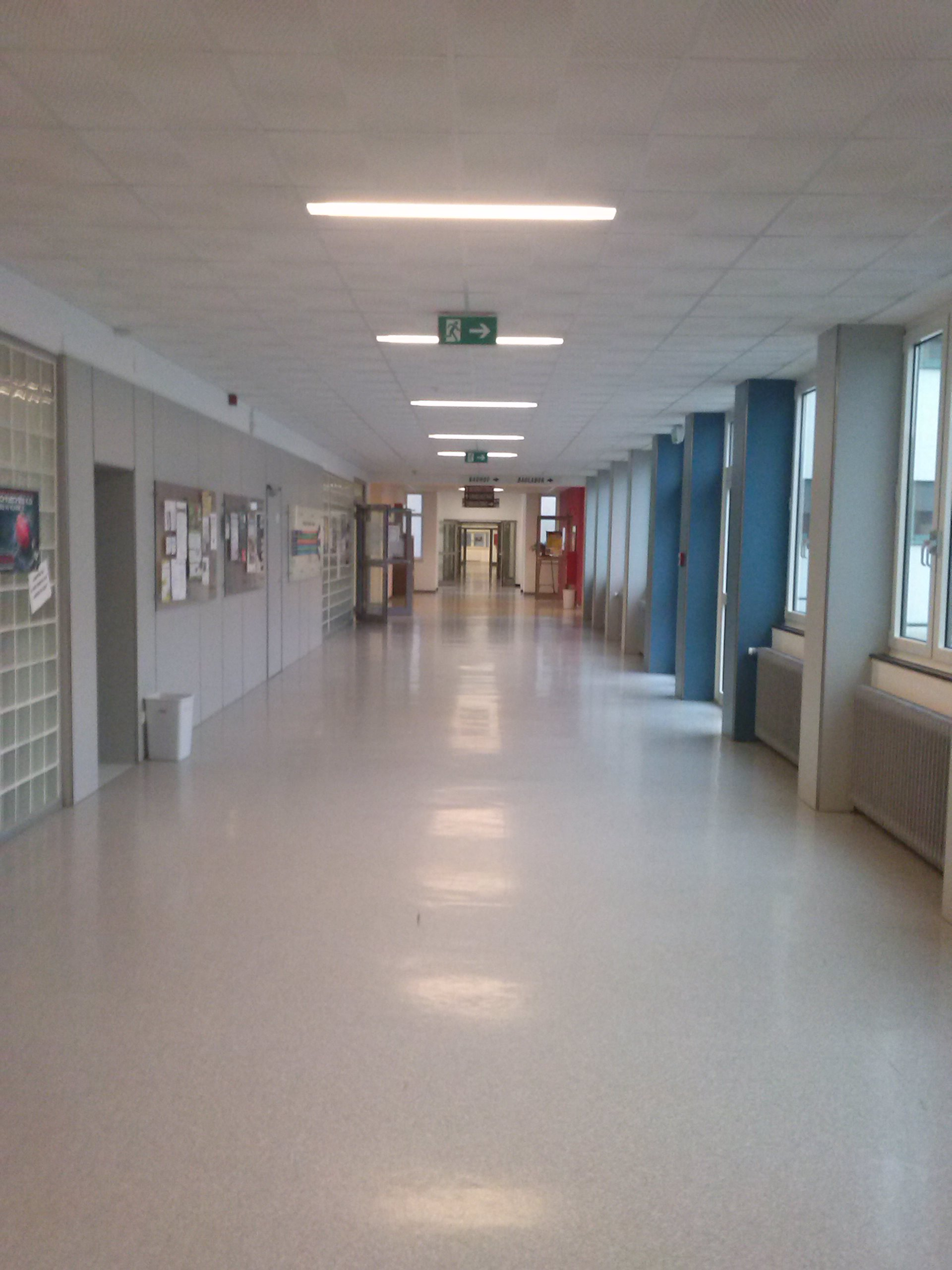 Innenbereich der HTBL